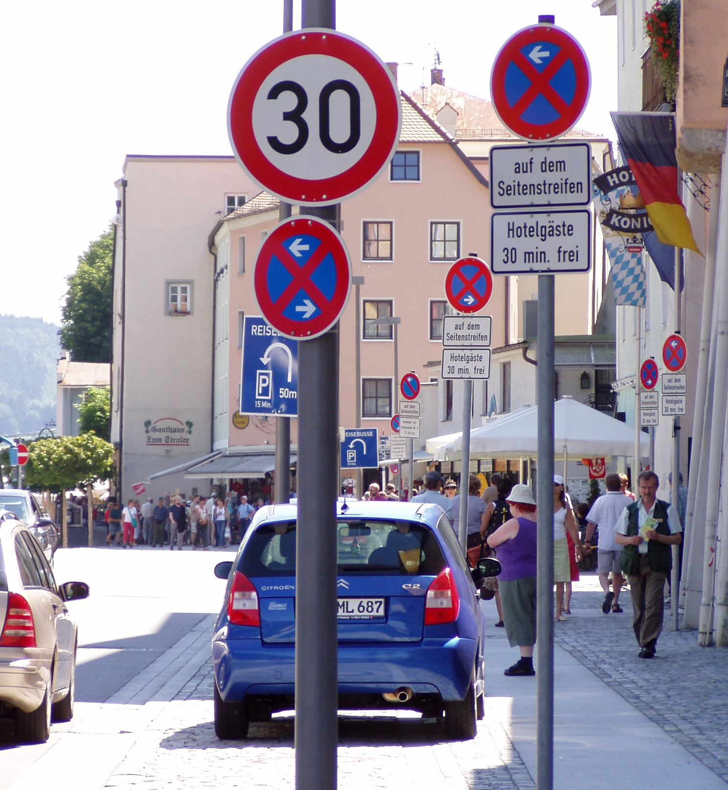 Häufung von Verkehrszeichen an der Donaulände in Passau.